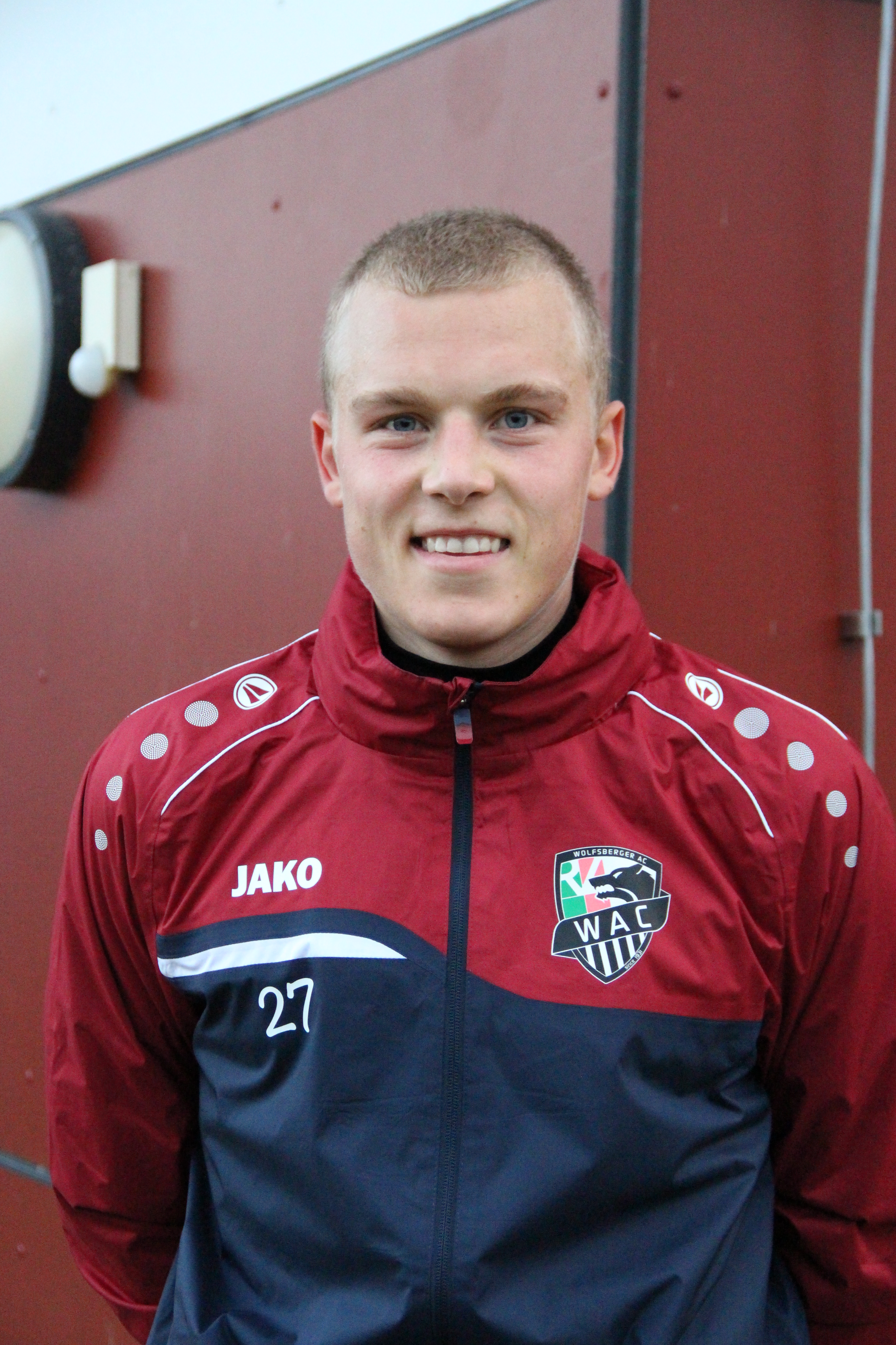 Sven Sprangler (WAC)